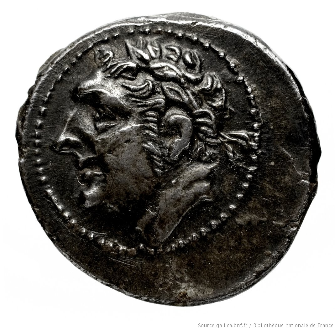 Jugurtha (roi de Numidie). Autorité émettrice de monnaie.